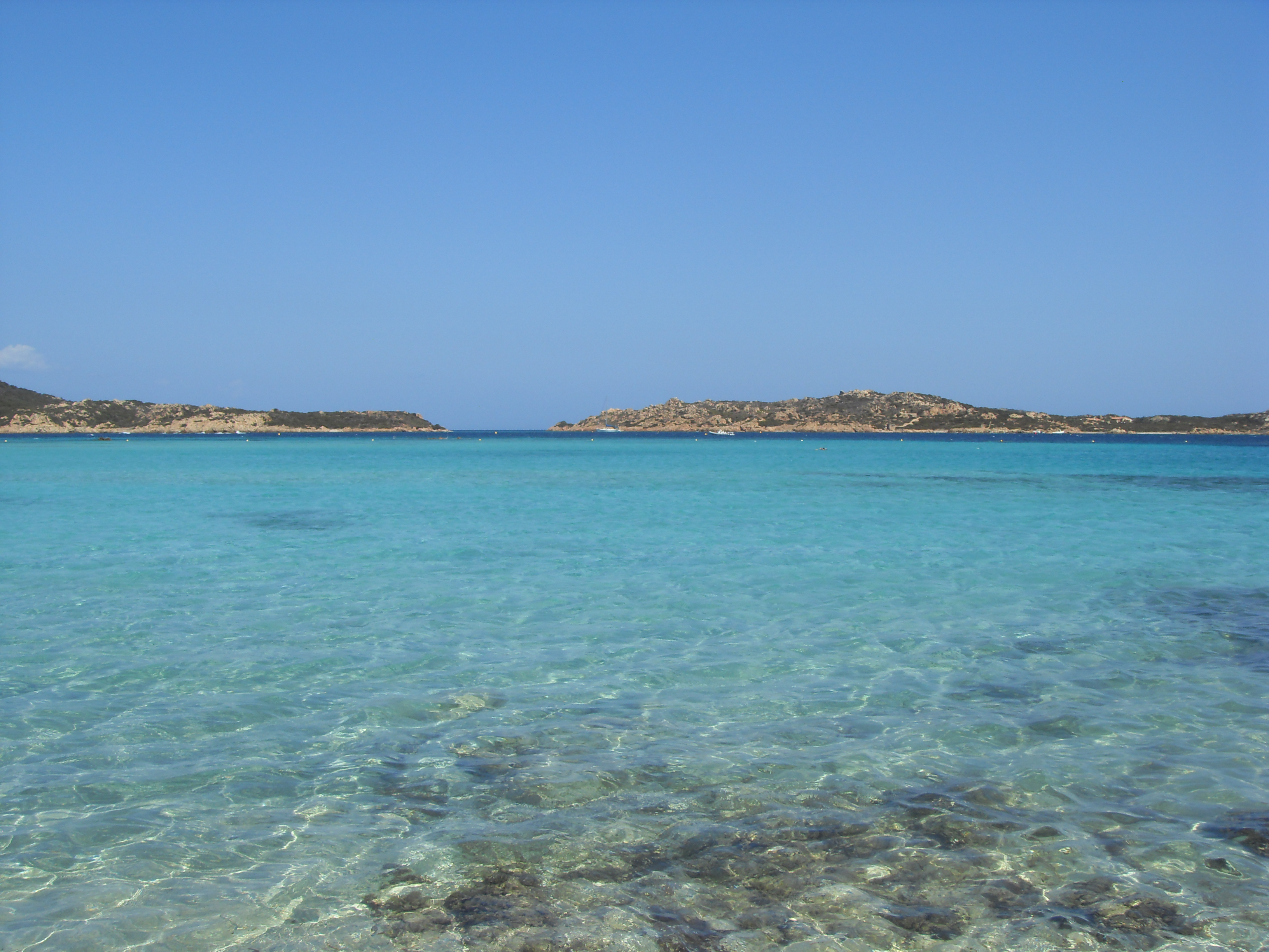 Parco Nazionale Arcipelago della Maddalena This is a photo of a monument which is part of cultural heritage of Italy.